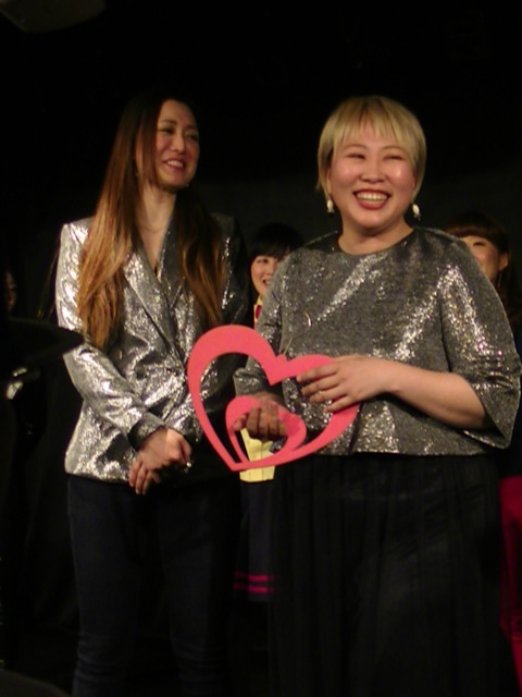 カーネリアン (お笑いコンビ) 2018年4月8日